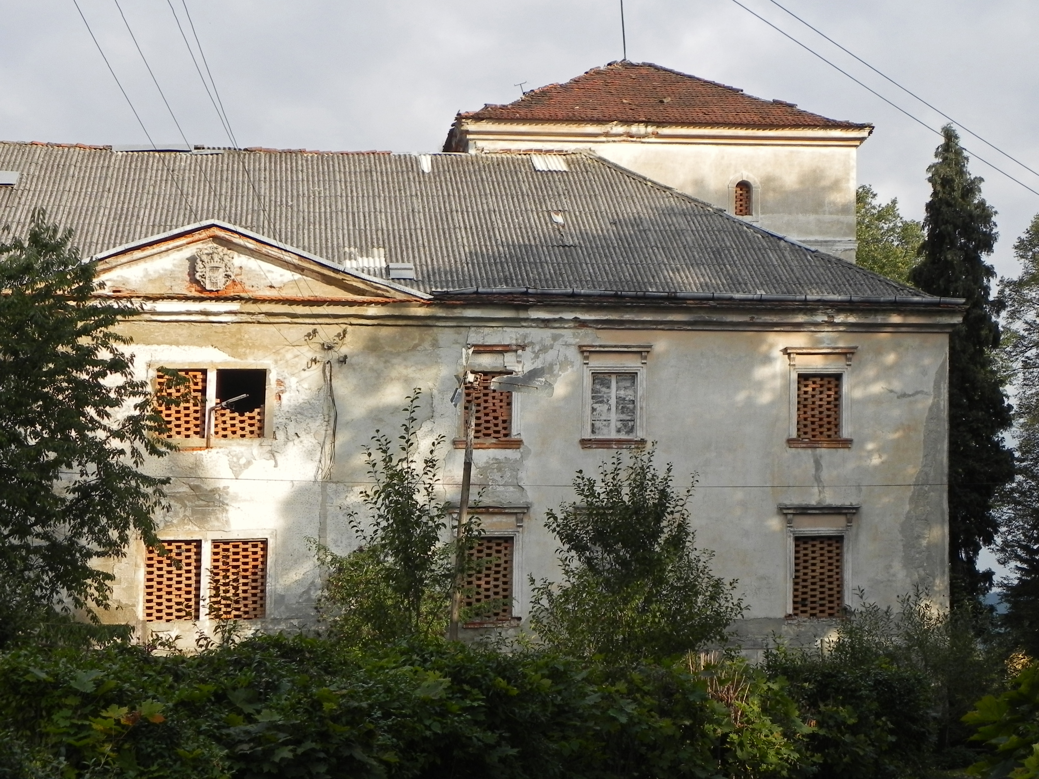 Ołdrzychowice Kłodzkie, dwór, XVIII, XIX